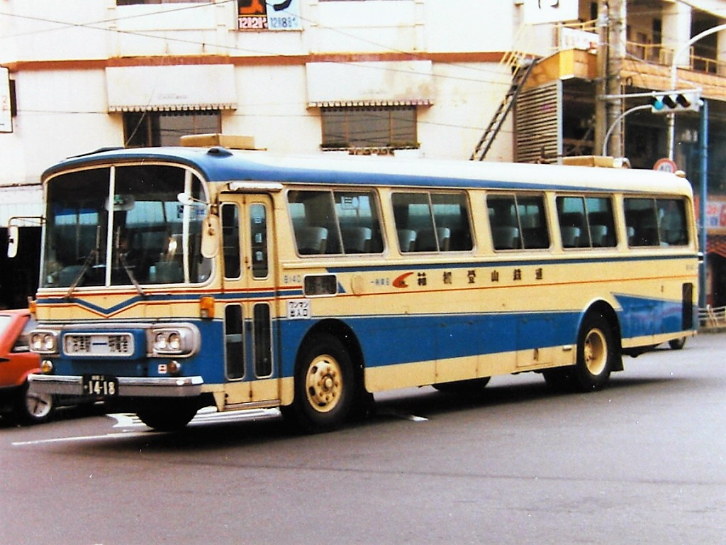 日野RV100P型バス 帝国車体 箱根登山鉄道